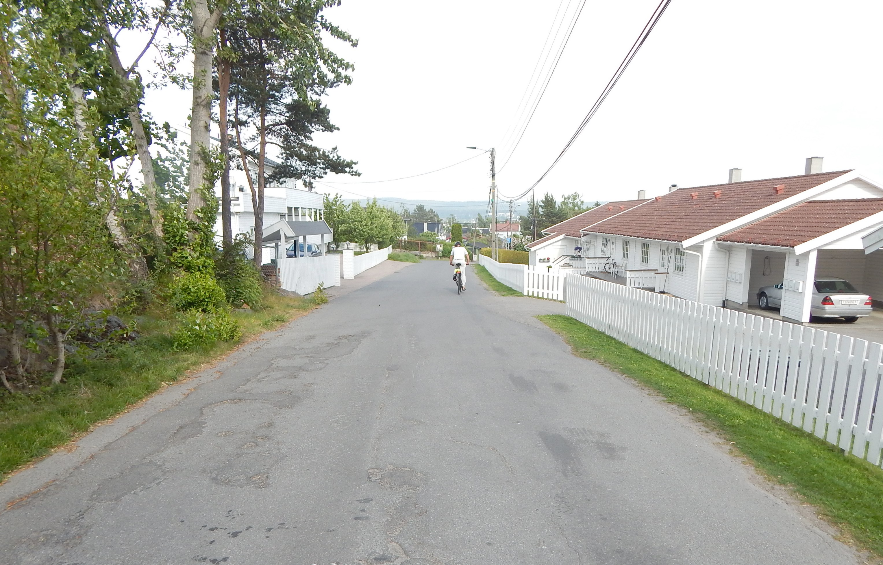 Vestengveien